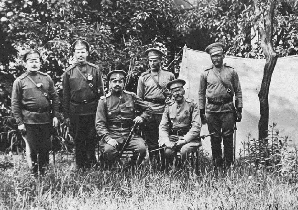 Гвардии полковник В. К. Шенк, профессор Н. С. Самокиш и нижние чины в саду при Императорской Главной Квартире. 1915 г. Россия. Ломжа.